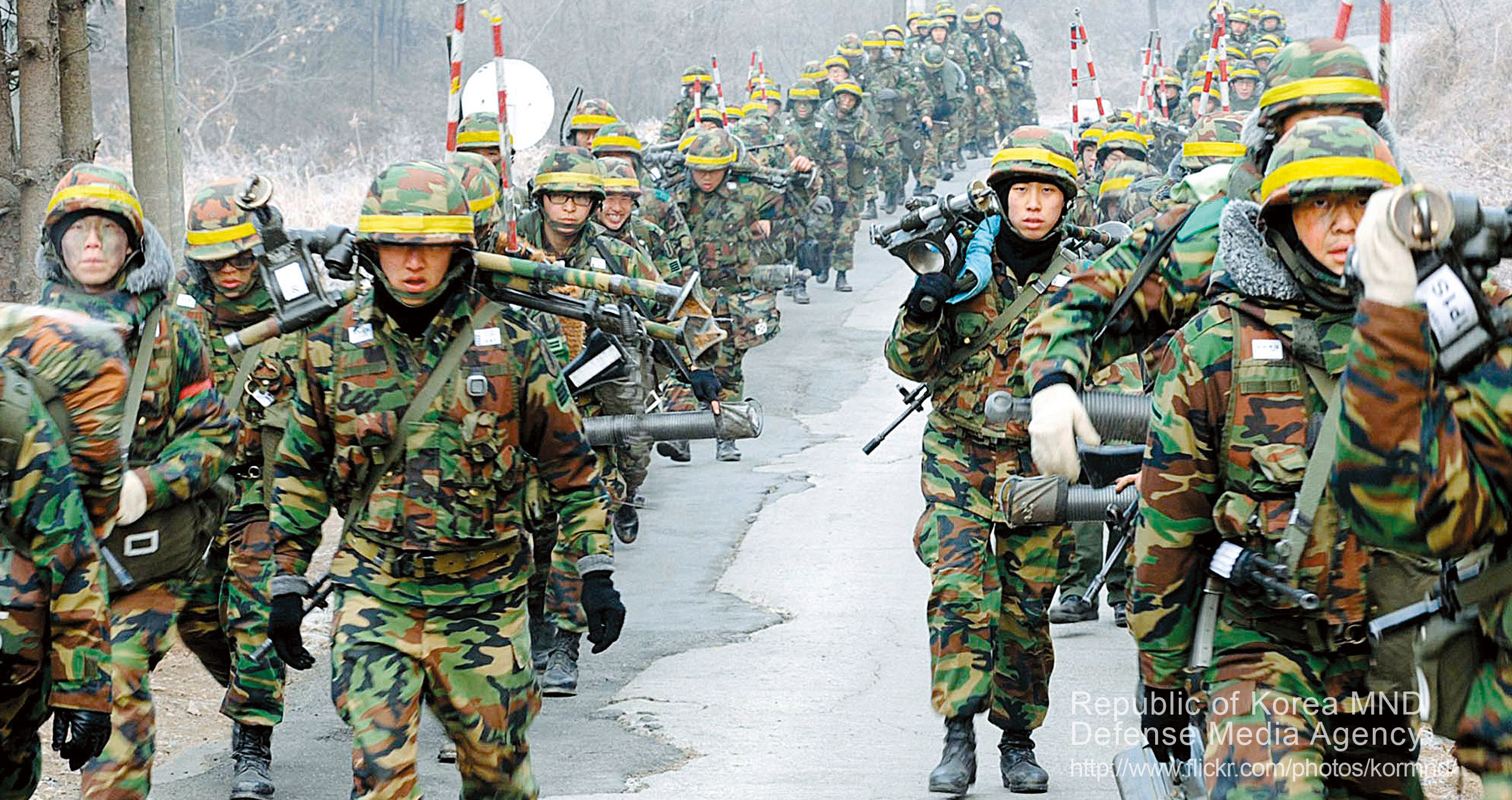 2009 국방화보 Rep. of Korea, Defense Photo Magazine 육군1사단 육탄연대 1대대 장병들이 72시간 연속 공격 임무 를 수행한 뒤 주둔지로 복귀하기 위해 행군하고 있다.